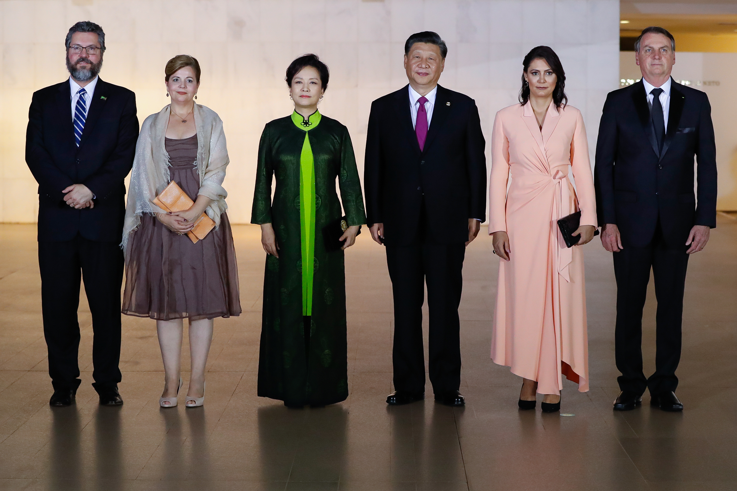 (Brasília - DF, 13/11/2019) Presidente da República, Jair Bolsonaro acompanhado da Primeira Dama, Michelle Bolsonaro recebem o Presidente da República Popular da China, Xi Jinping e Senhora Peng Liyuan. Foto: Alan Santos/PR